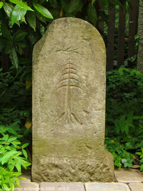 Historischer Grenzstein mit Ilsfelder Wappen (Hirschstange über Baum), aufgestellt bei der evang. Kirche Ilsfeld